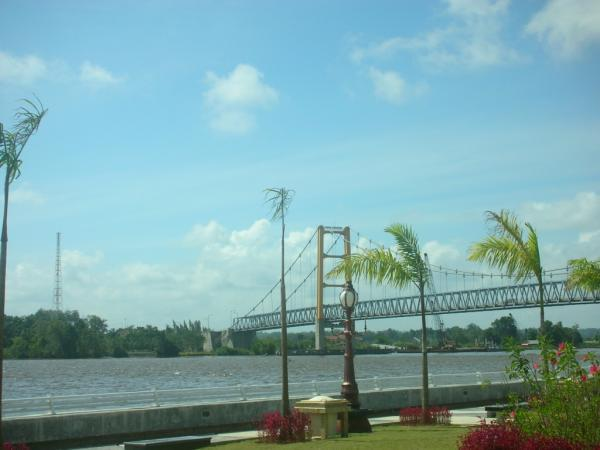 Kutai Kartanegara bridge, Tenggarong, East Kalimantan province, Indonesia